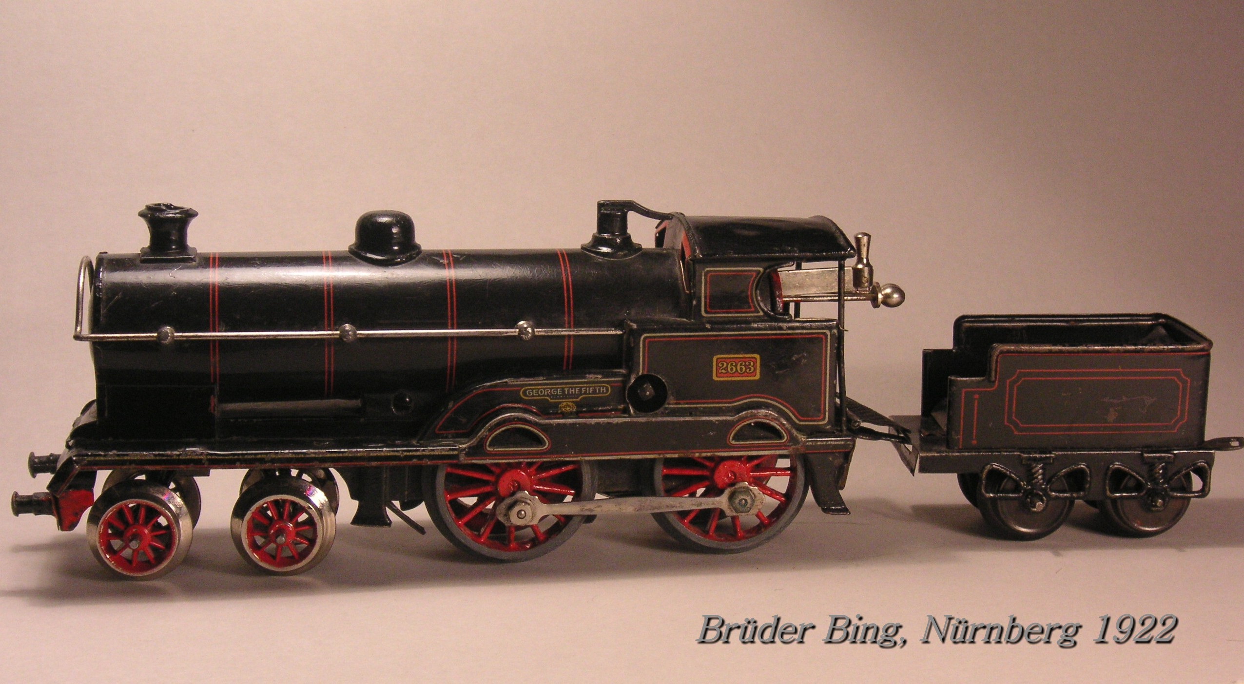 Gebrüder Bing Spielzeuglok "George V."